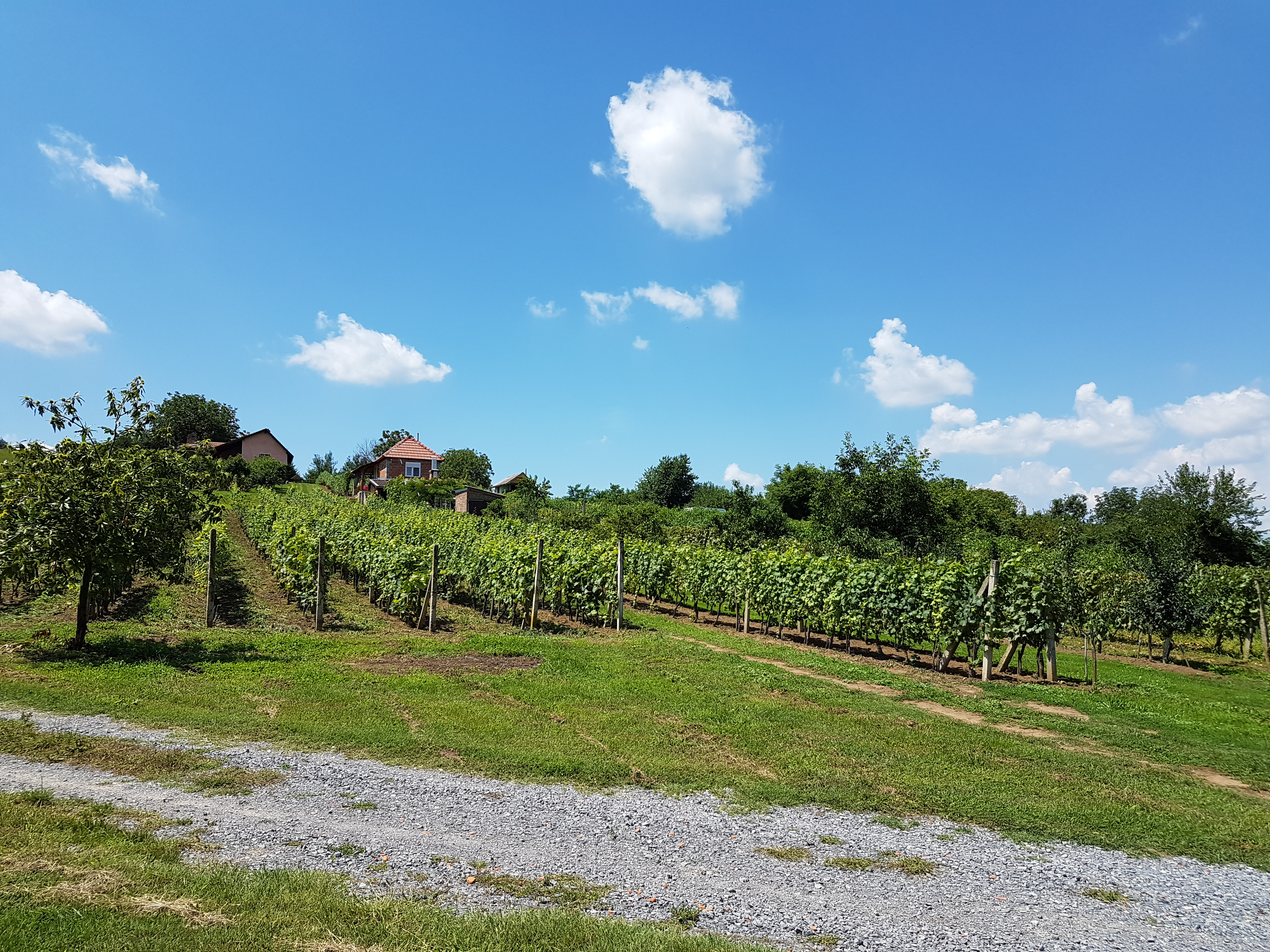 Bukovački vinogradi.